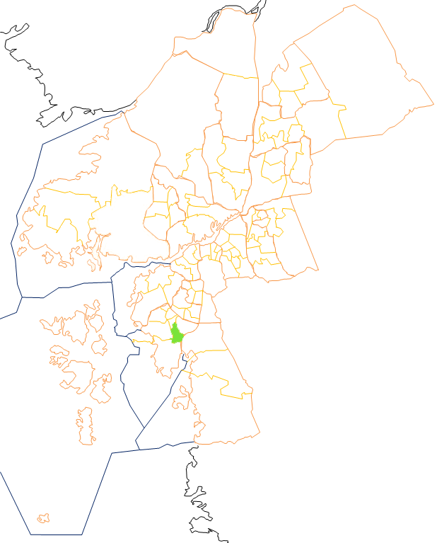 Karta som visar primärområdes belägenhet i Göteborg